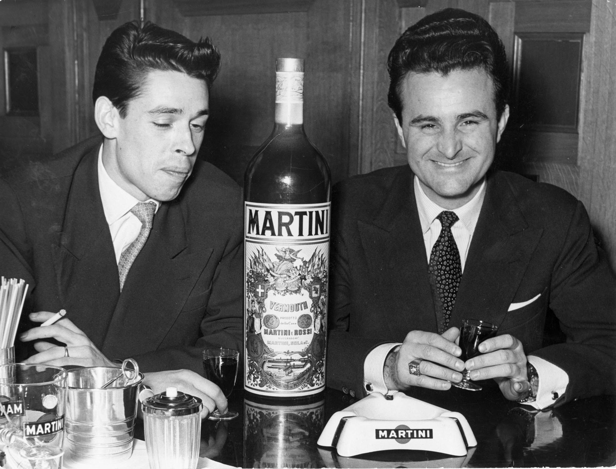 Jacques Brel en avant-programme de Bobbejaan Schoepen (Bobby Jean/Bobby Jann), Ancienne Belgique, Bruxelles, 8 au 13 janvier 1955. Bobbejaan Schoepen, né le 16 mai 1925 à Boom, est un chanteur-guitariste belge. Il a également été amuseur, parodiste, acteur, fantaisiste et connu pour ses talents de siffleur accompli et virtuose. Il est le fondateur et l'ancien directeur du parc d'attraction Bobbejaanland.